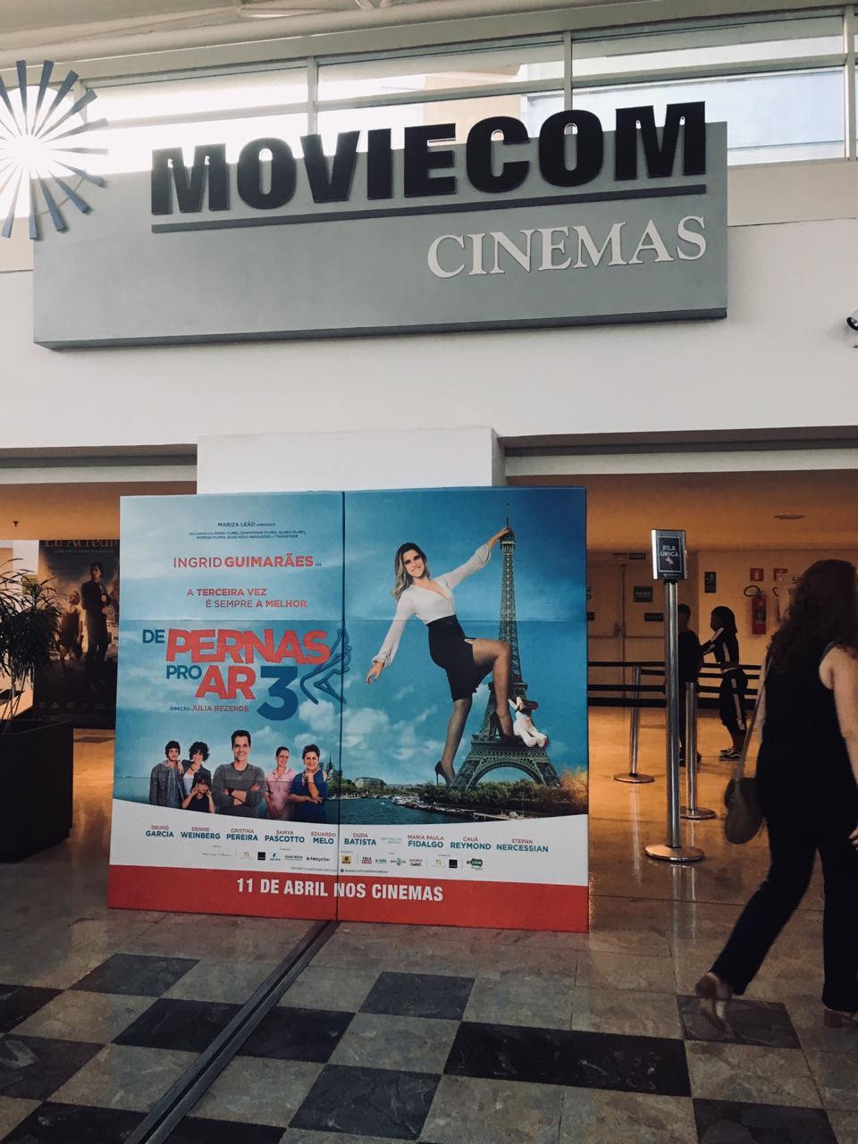 Imagens do Complexo de cinemas da rede Moviecom, localizado no Shopping Penha, São Paulo, SP